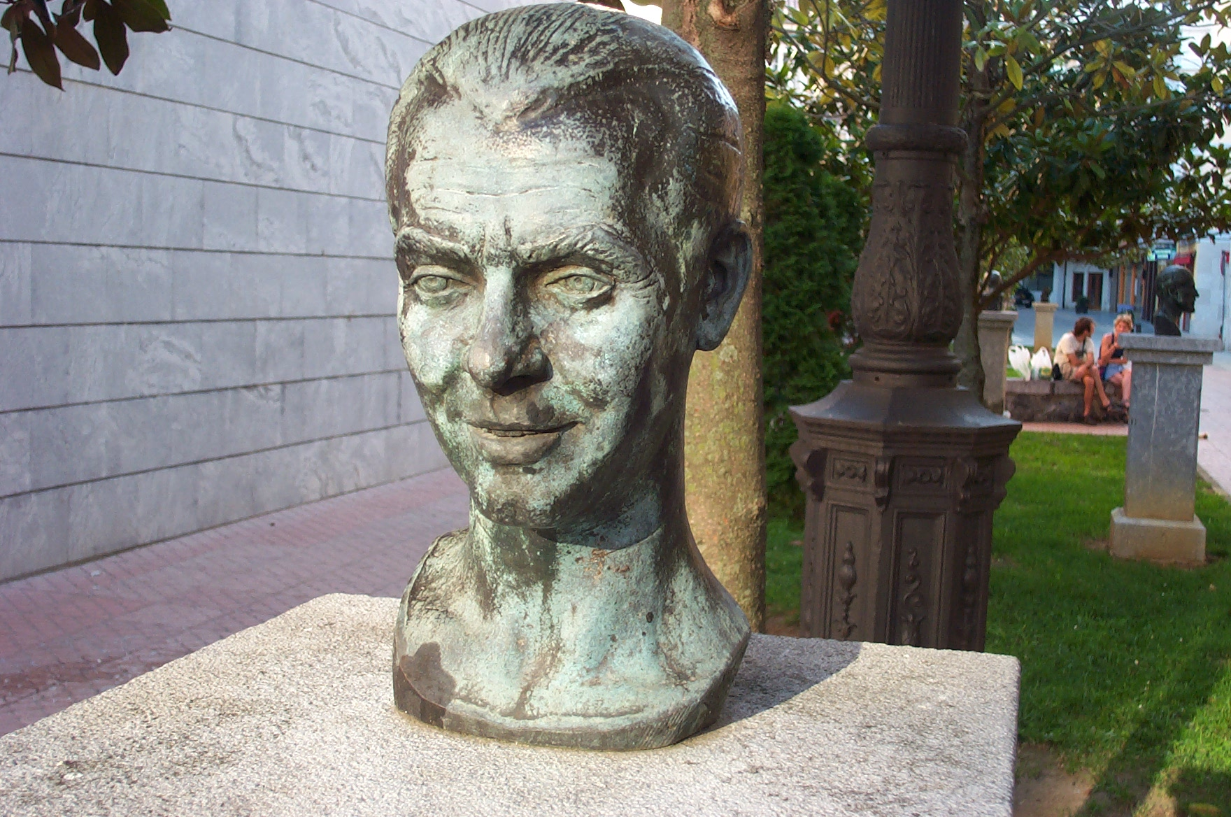 Busto de Federico García Lorca en Santoña, Cantabria